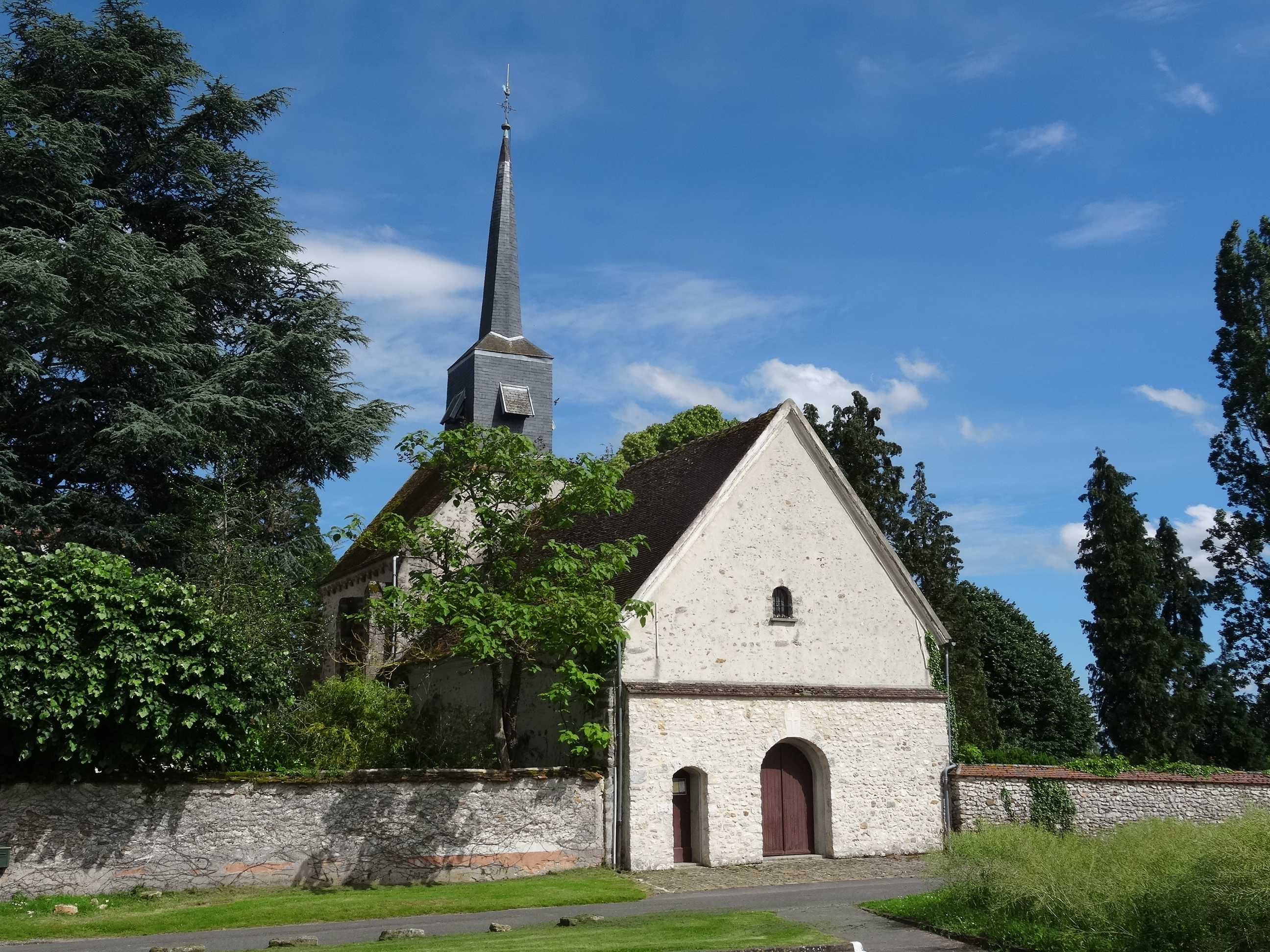 Église Saint-Pierre-ès-Liens de Chartronges. (Seine-et-Marne, région Île-de-France).